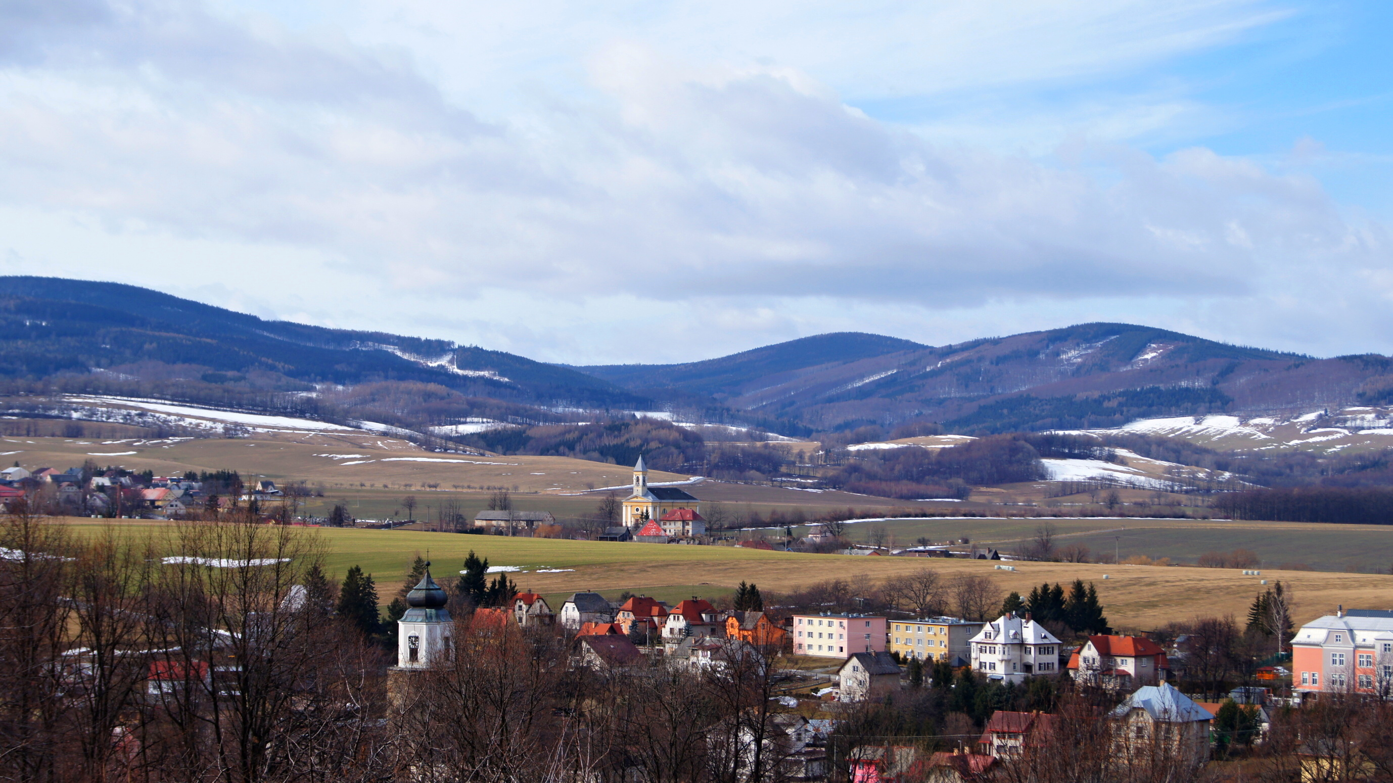 žulová